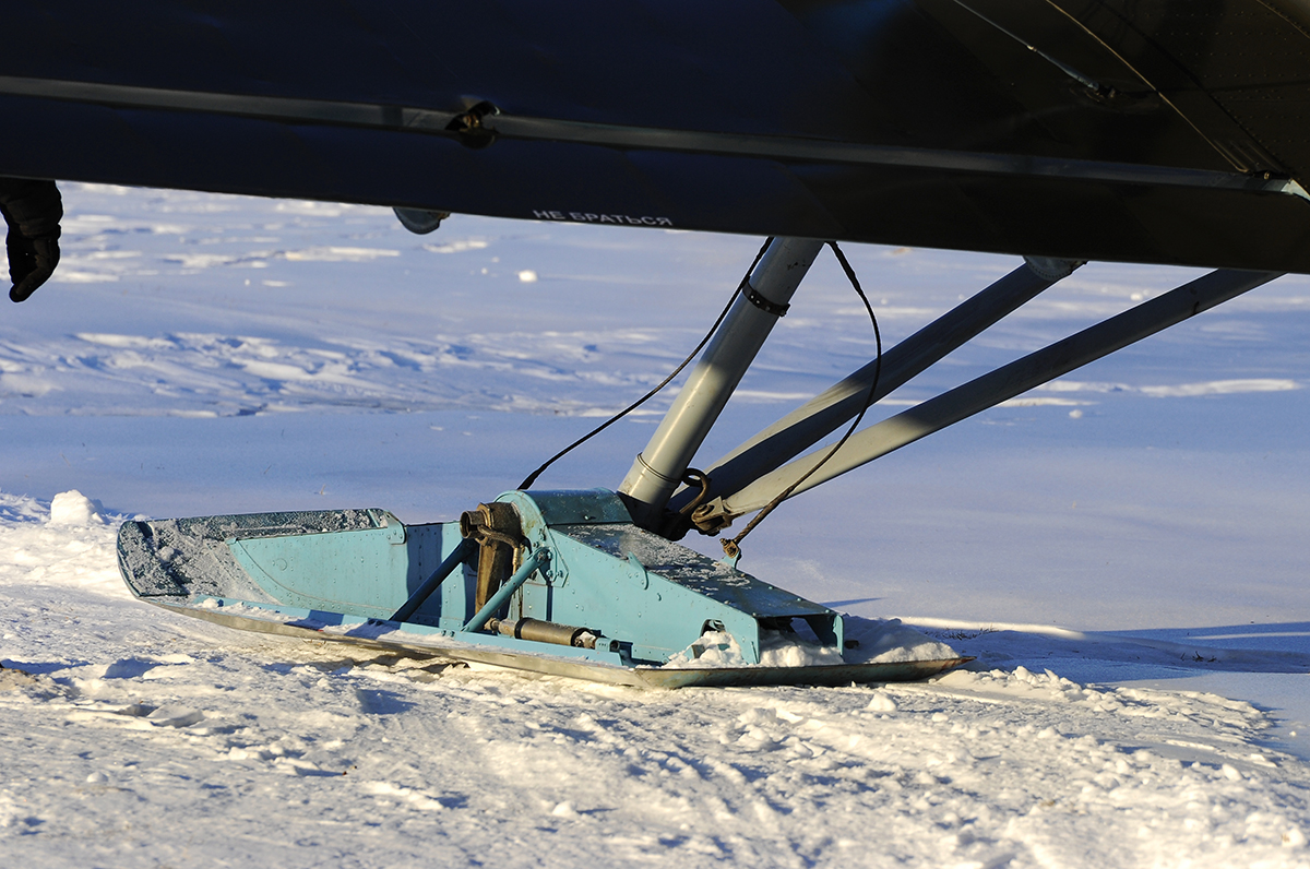 Ski An-2